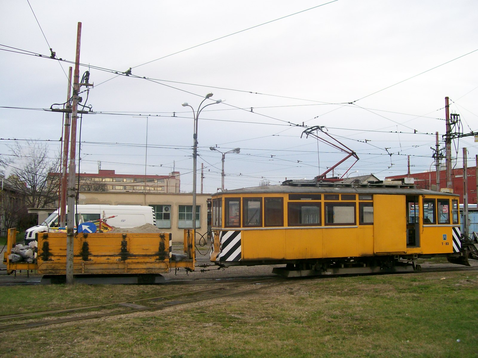 Tramvaj ralica i teretna prikolica u spremištu Trešnjevka